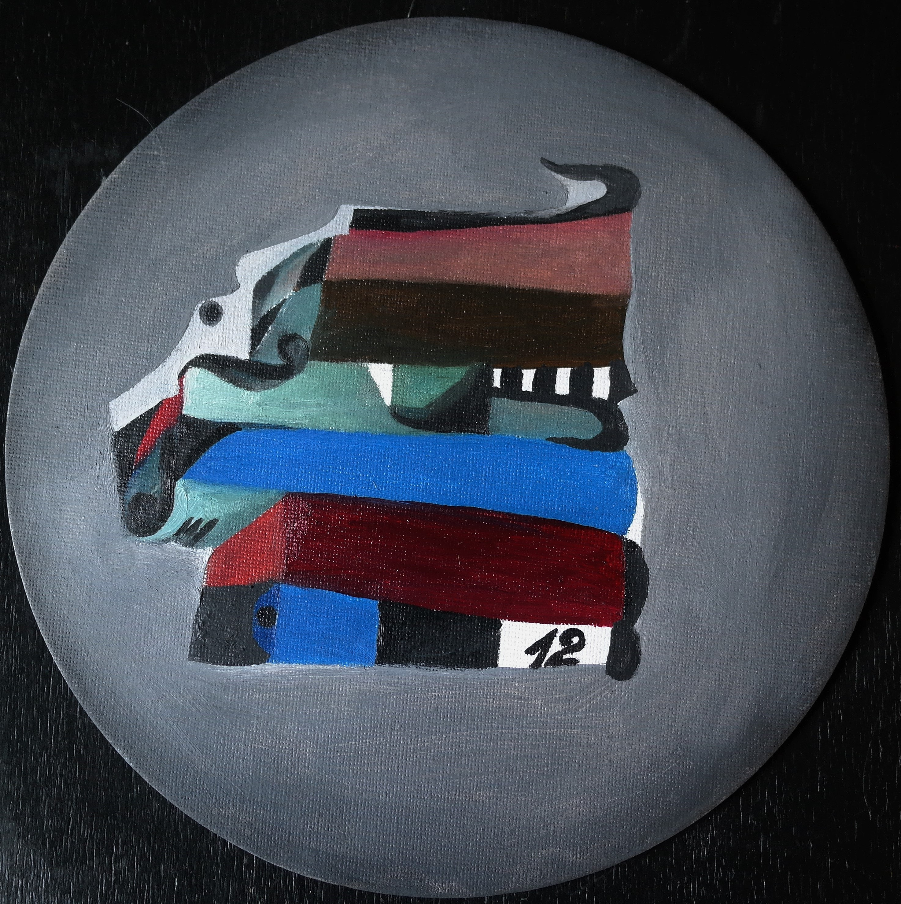 Круглая картина N°2 из серии "Звуковые Башни", 2016